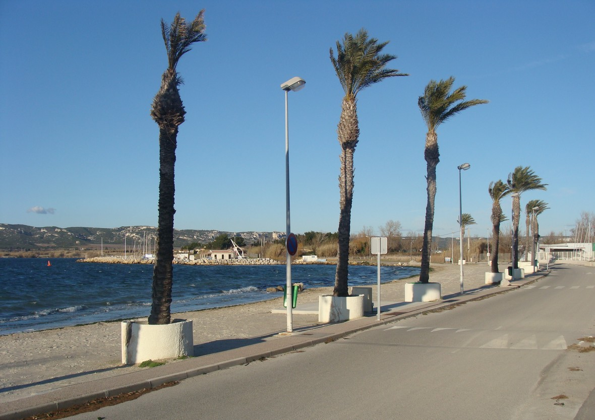 La plage de Champigny (commune de Berre), jouxtant l'embouchure de l'Arc, côté nord.